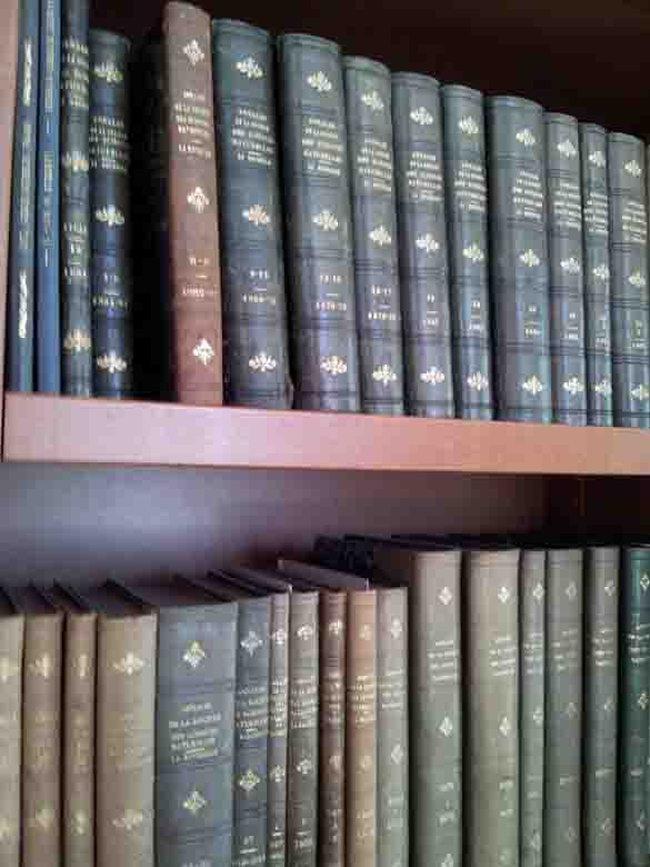 Bibliothèque des annales de la Société des Sciences Naturelles de la Charente-Maritime